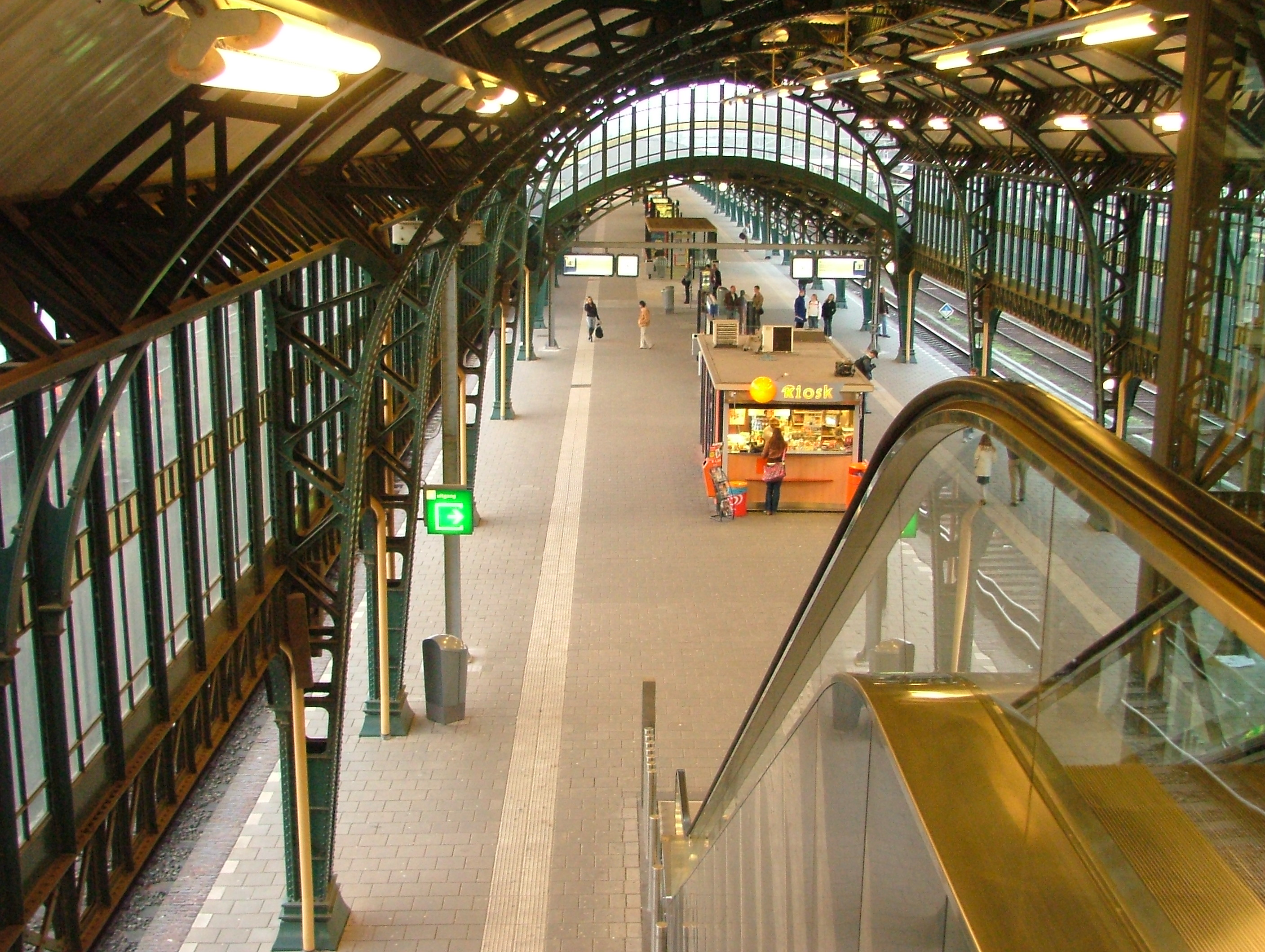 Perronskappen 's Hertogenbosch